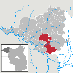 Plattenburg in Brandenburg (Country) - District Prignitz